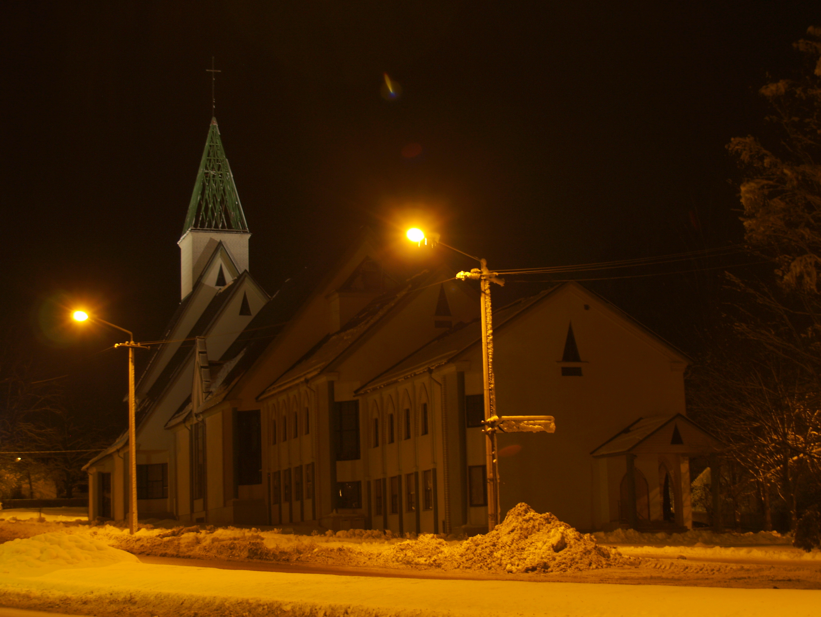 Tartu Salemi kirik talvel.